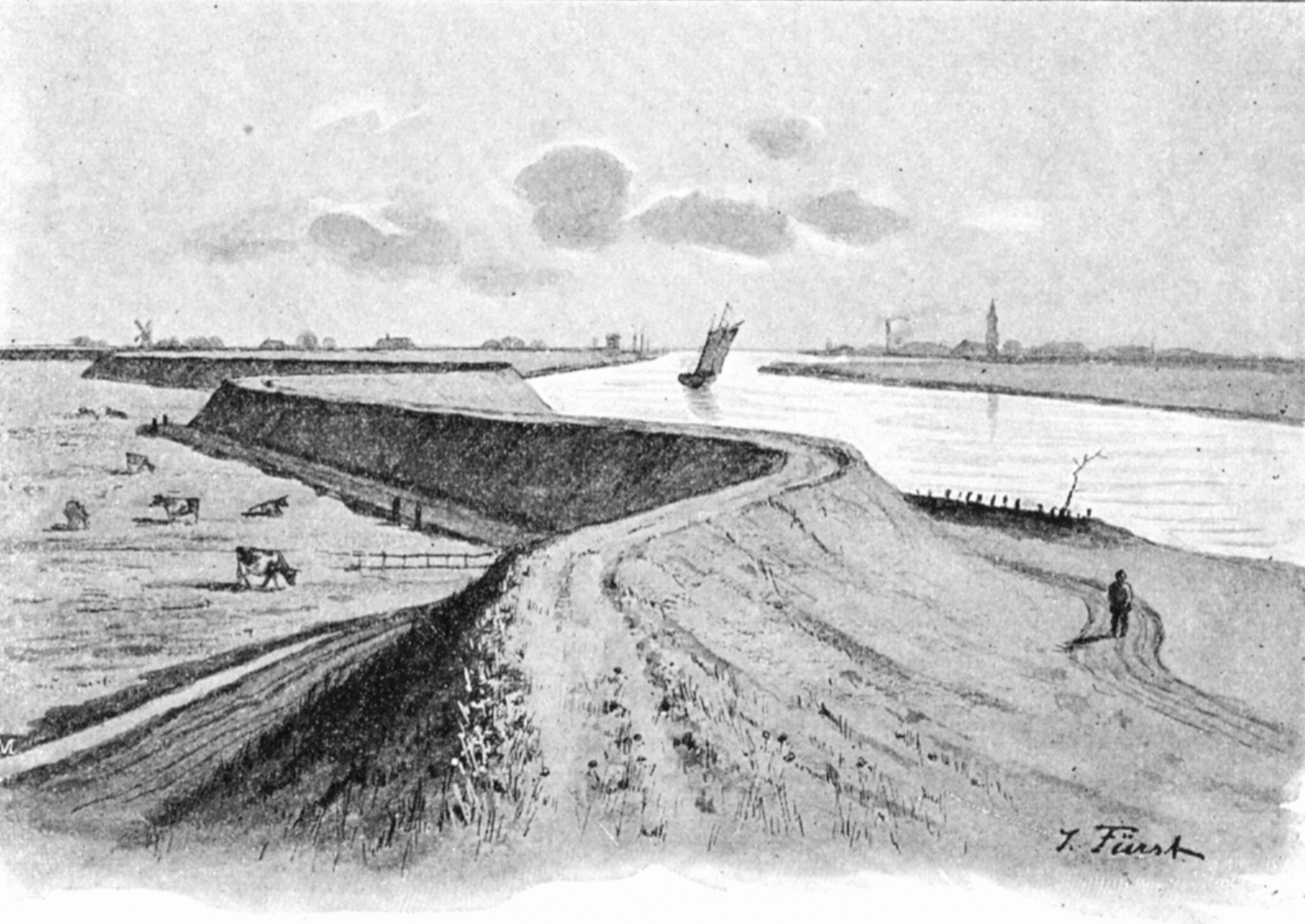 Blick über die Eider bei Wollersum (Groven (Dithmarschen), Zeichnung von Julius Fürst um 1895